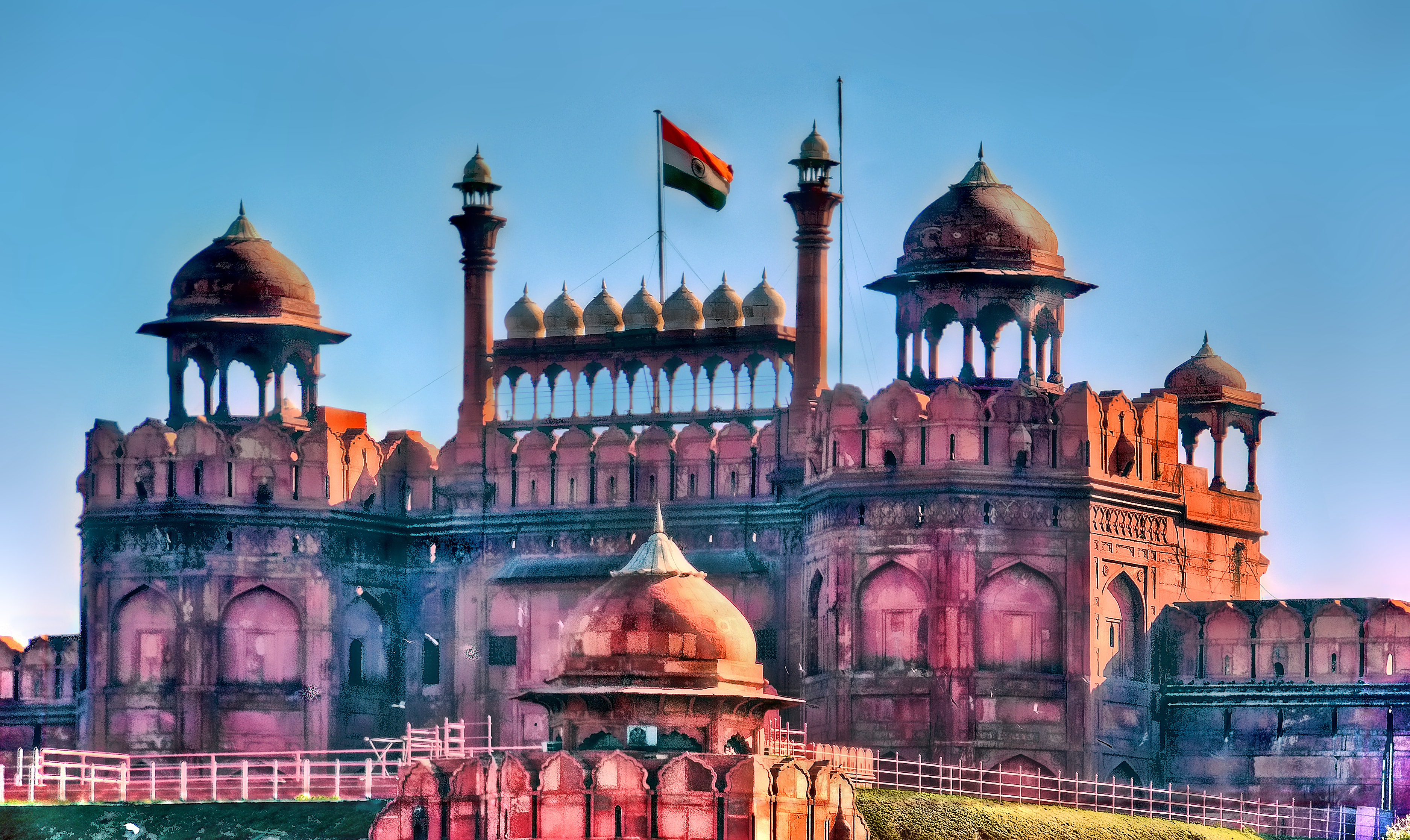 Red fort, Delhi